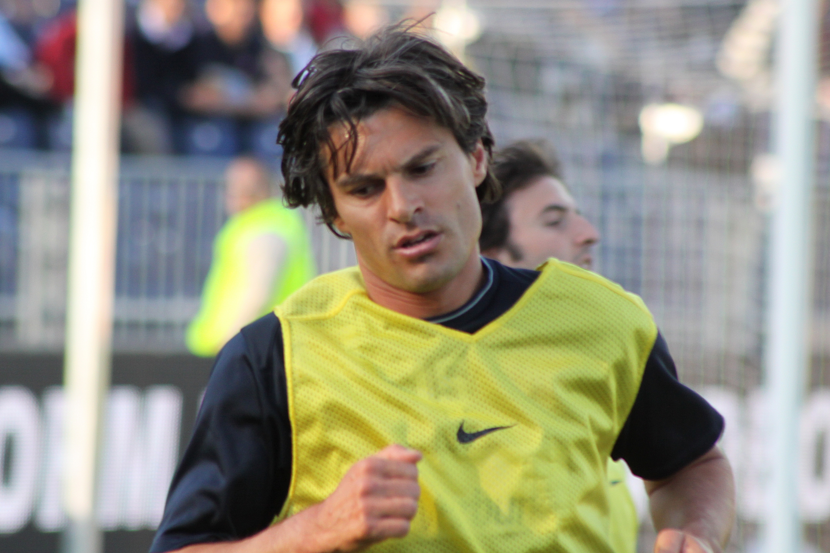 Jocelyn Blanchard - FK Austria Wien (quer)